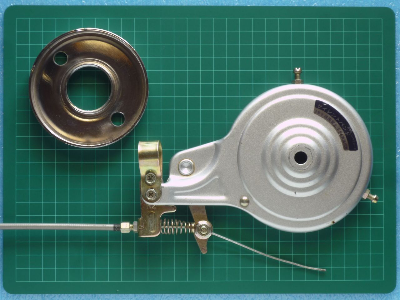 自転車後輪用ブレーキ バンドブレーキ 表面